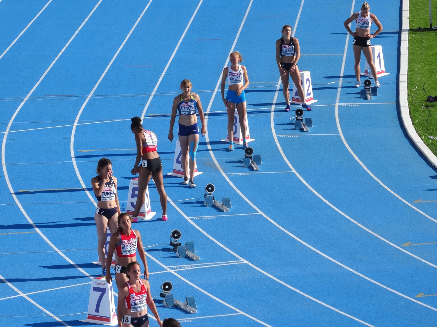 Młodzieżowe Mistrzostwa Europy w Lekkoatletyce U23 w Bydgoszczy 13-16 lipca 2017, siedmiobój kobiet; bieg na 200 m